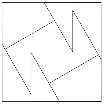 Dissection du carré en trois carrés congruents. Toutes les pièces ont même surface.